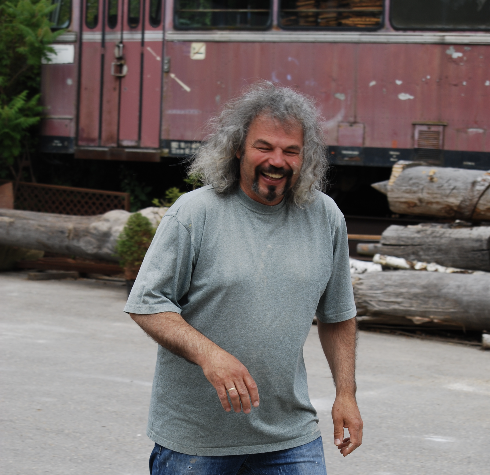 Portrait Mathias Schweikle